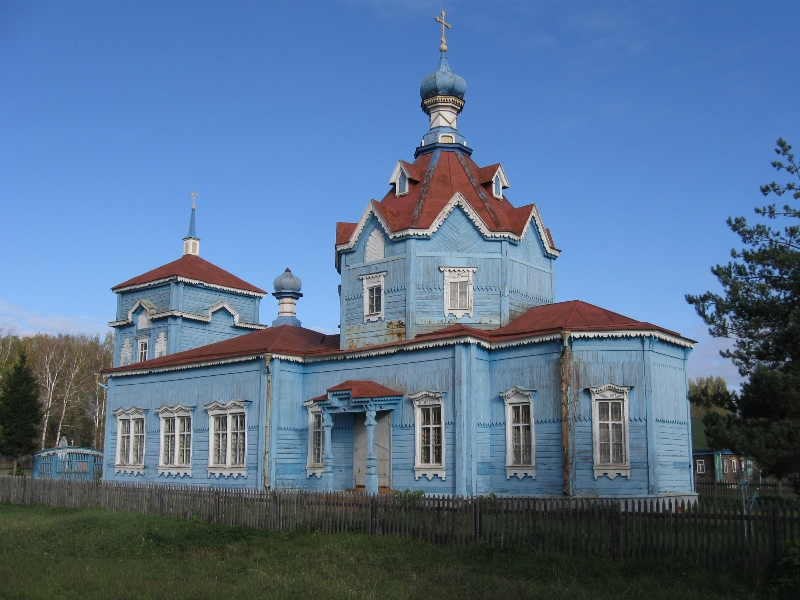 Богородицкая церковь: Боровое, Шиловский район, Рязанская область